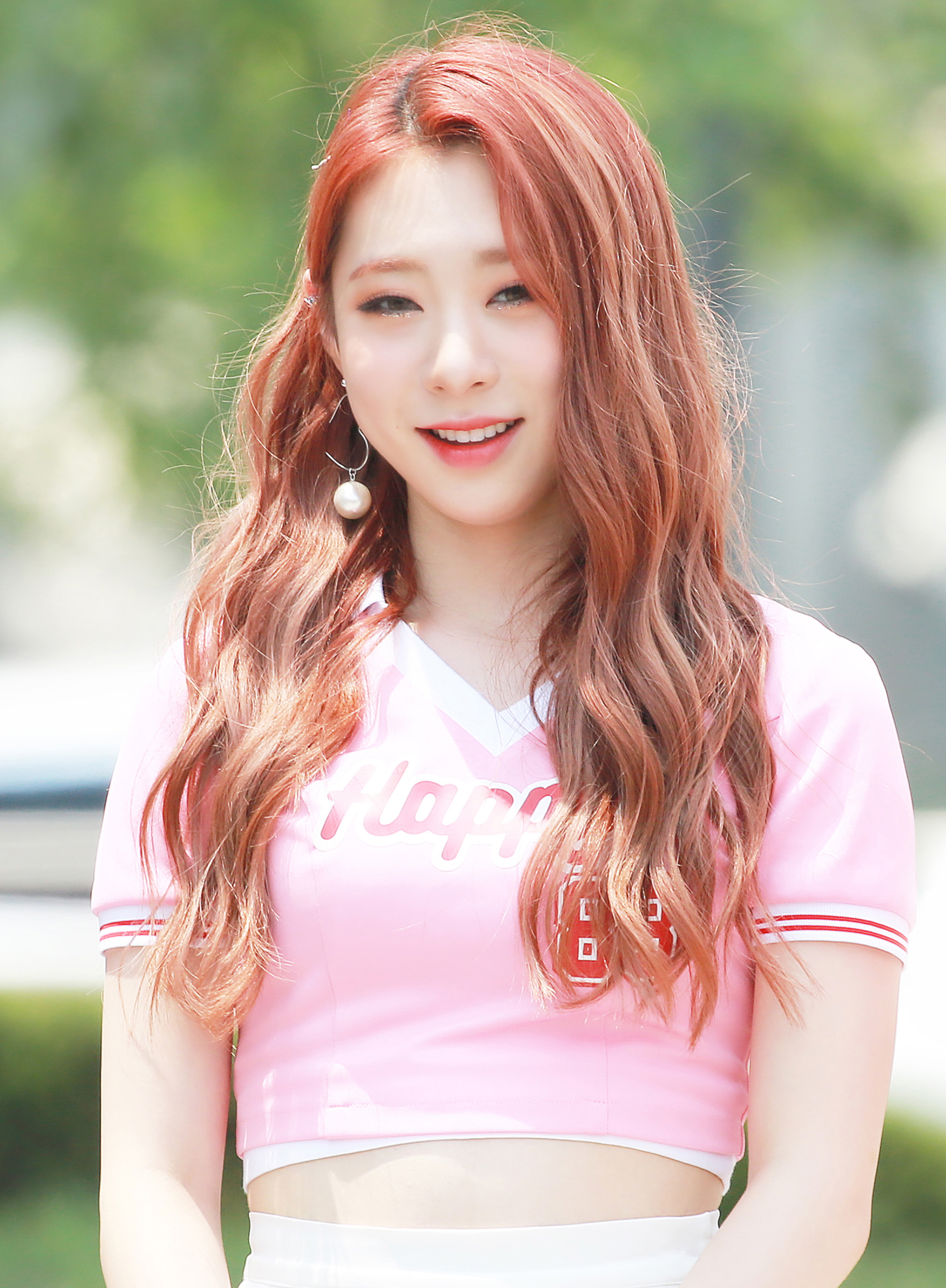 170617 유연정 미니팬미팅